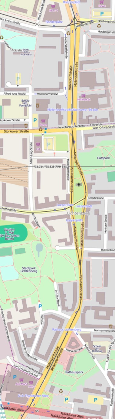 Bezirk Lichtenberg, Möllendorffstraße; Verlauf aus OSM